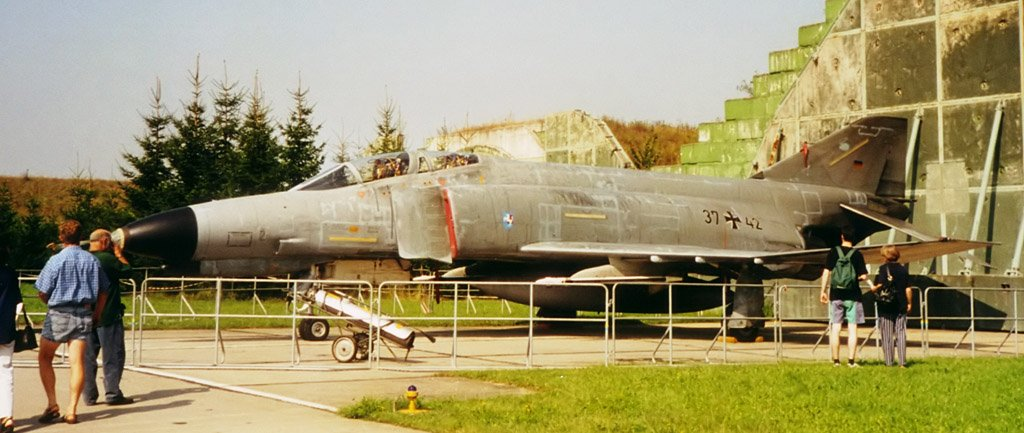 Beschreibung:F4 Phantom in Laage